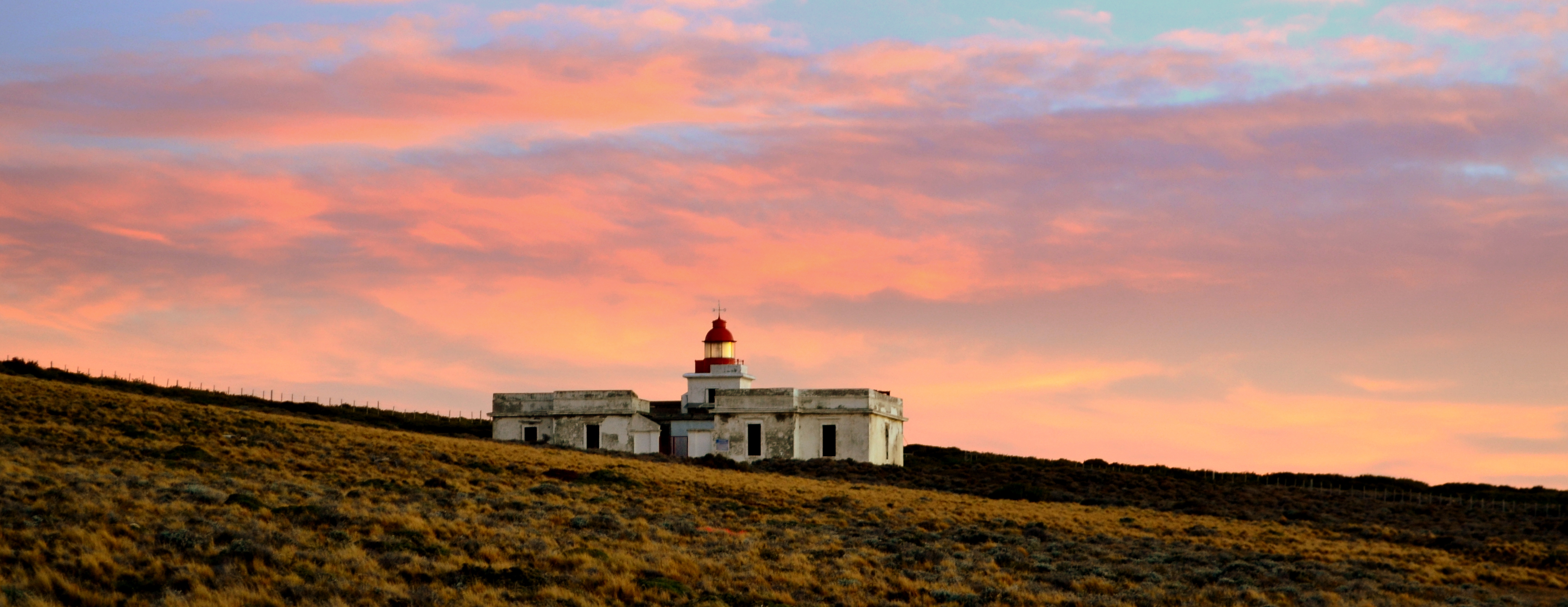 VISTA PANORÁMICA DE FARO POSESIÓN EN EL CABO POSESIÓN, PATAGONIA CHILENA